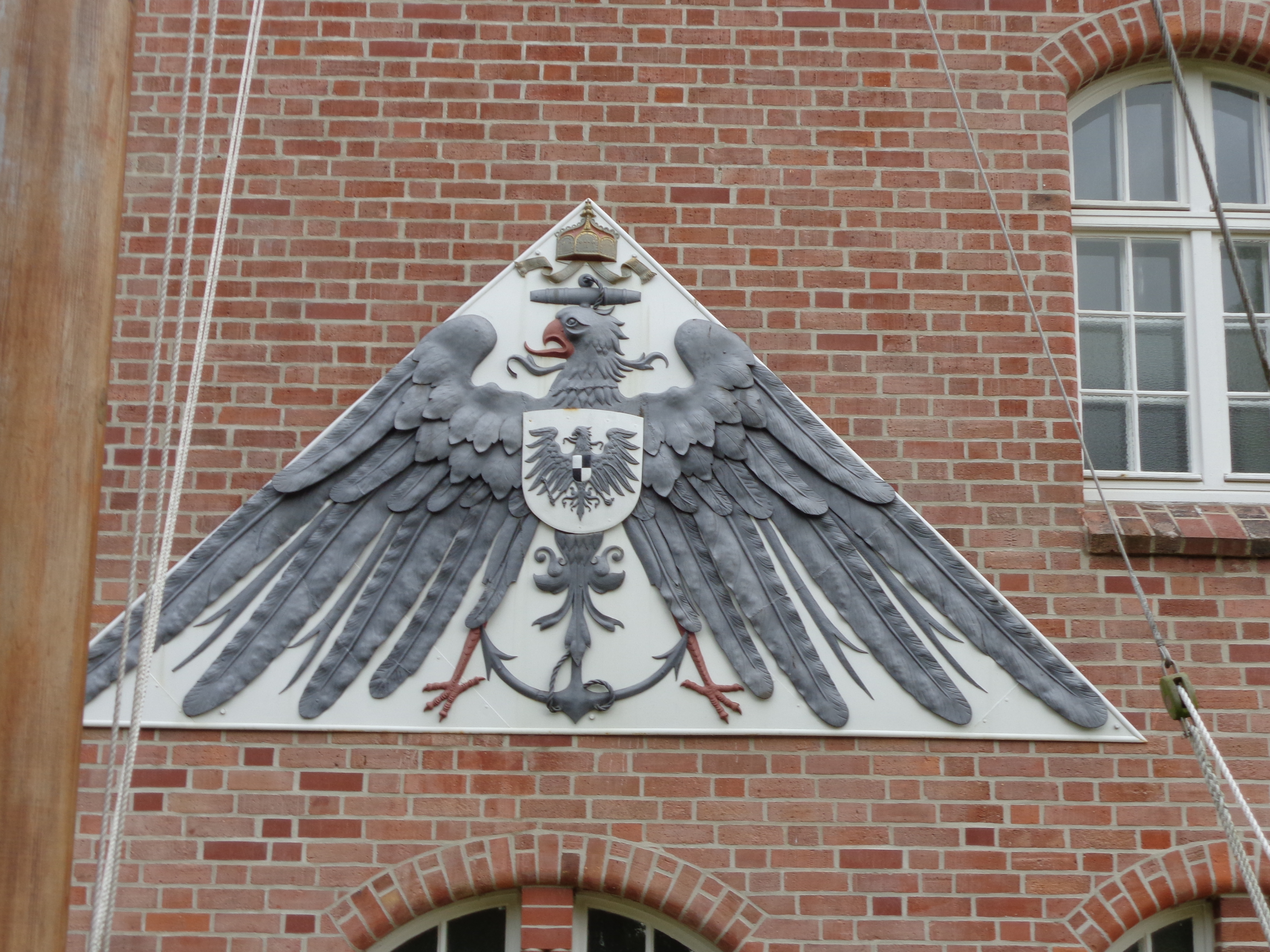 Bugzier der kaiserlichen Marine am Westflügel der Marineschule Mürwik